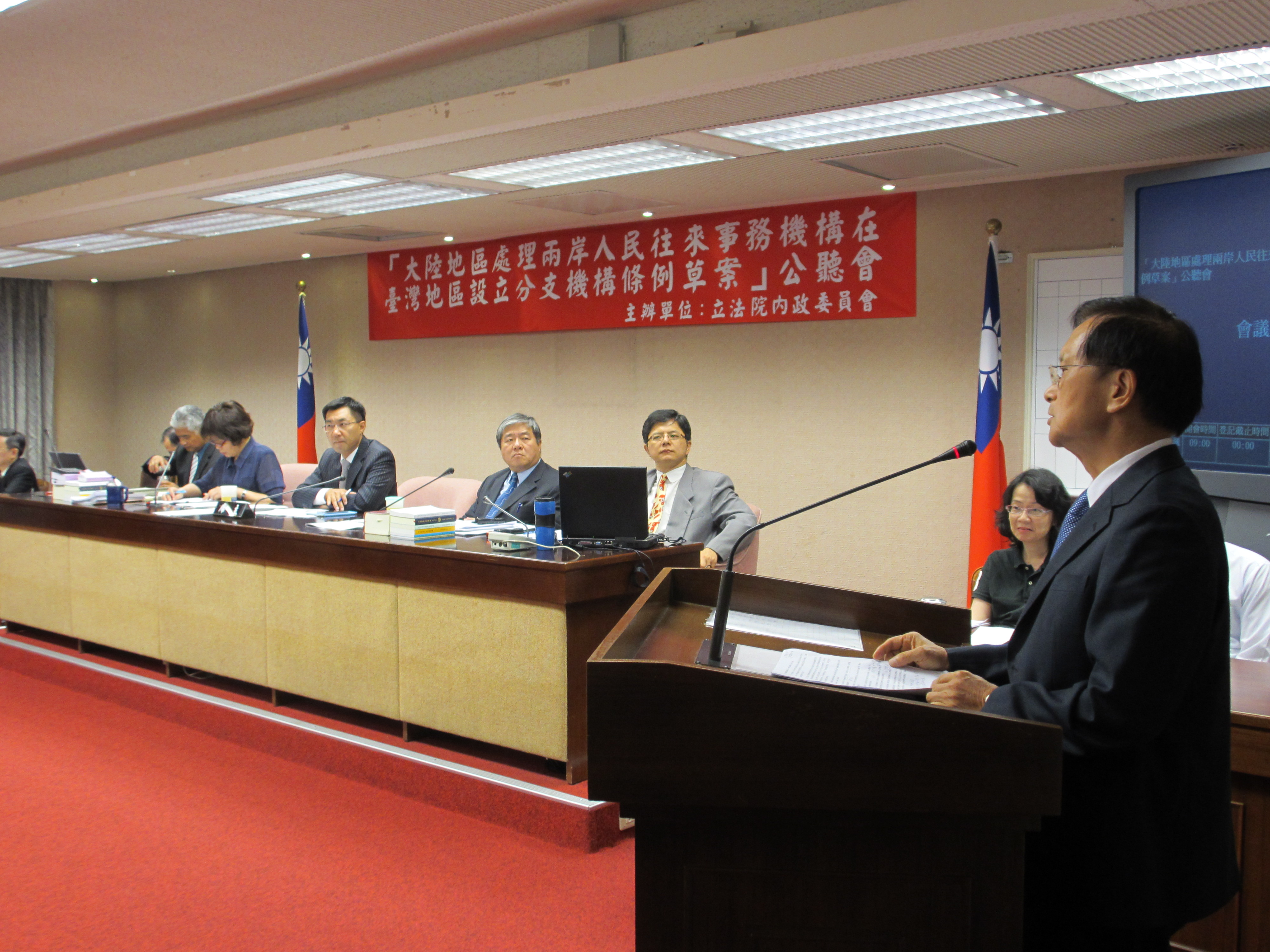 立法院內政委員會就兩岸互設辦事機構條例草案舉行公聽會。